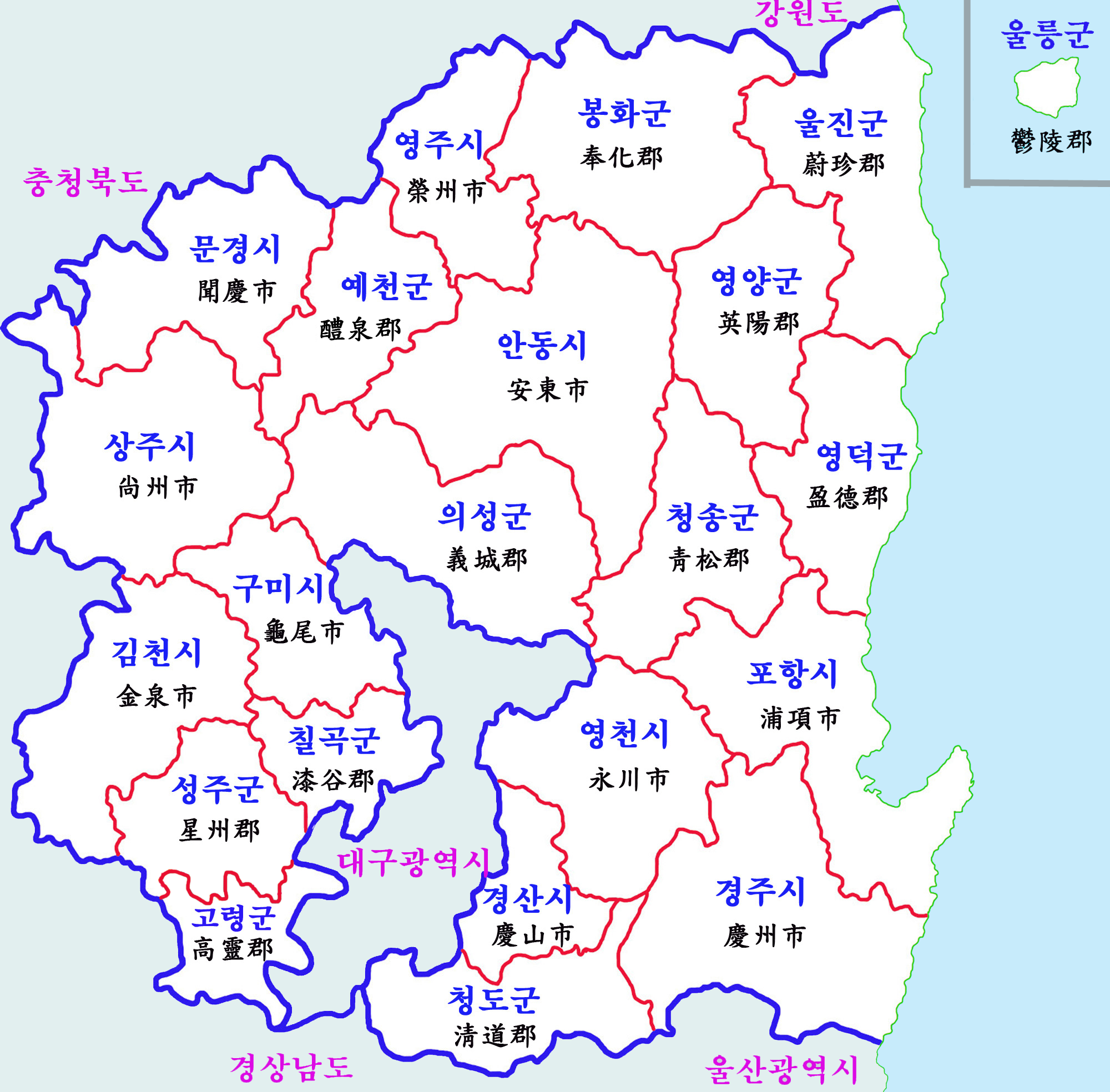 경상북도 행정구역도